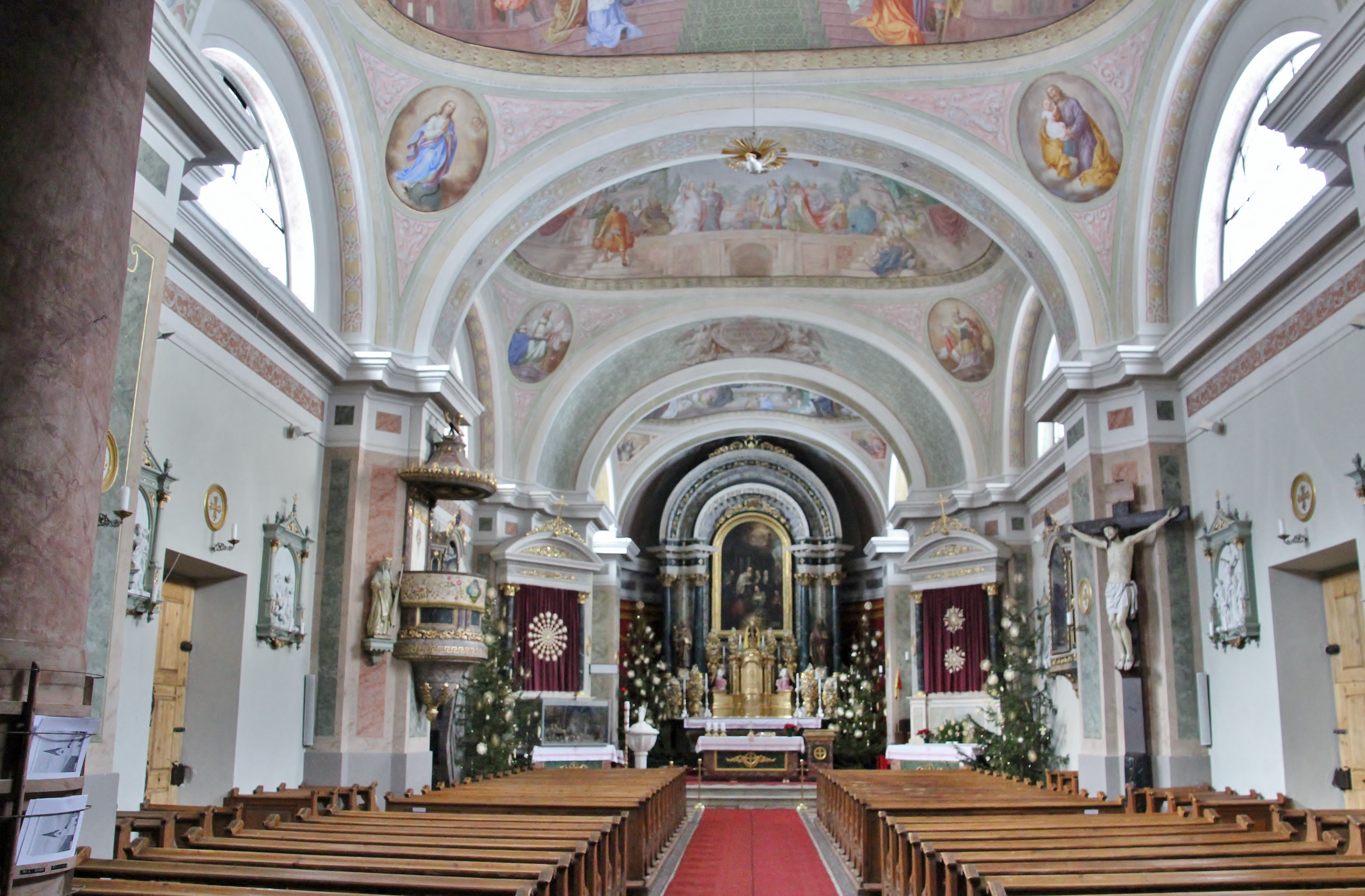 Innenraum der Pfarrkirche St. Gertraud in Mühlwald, Südtirol